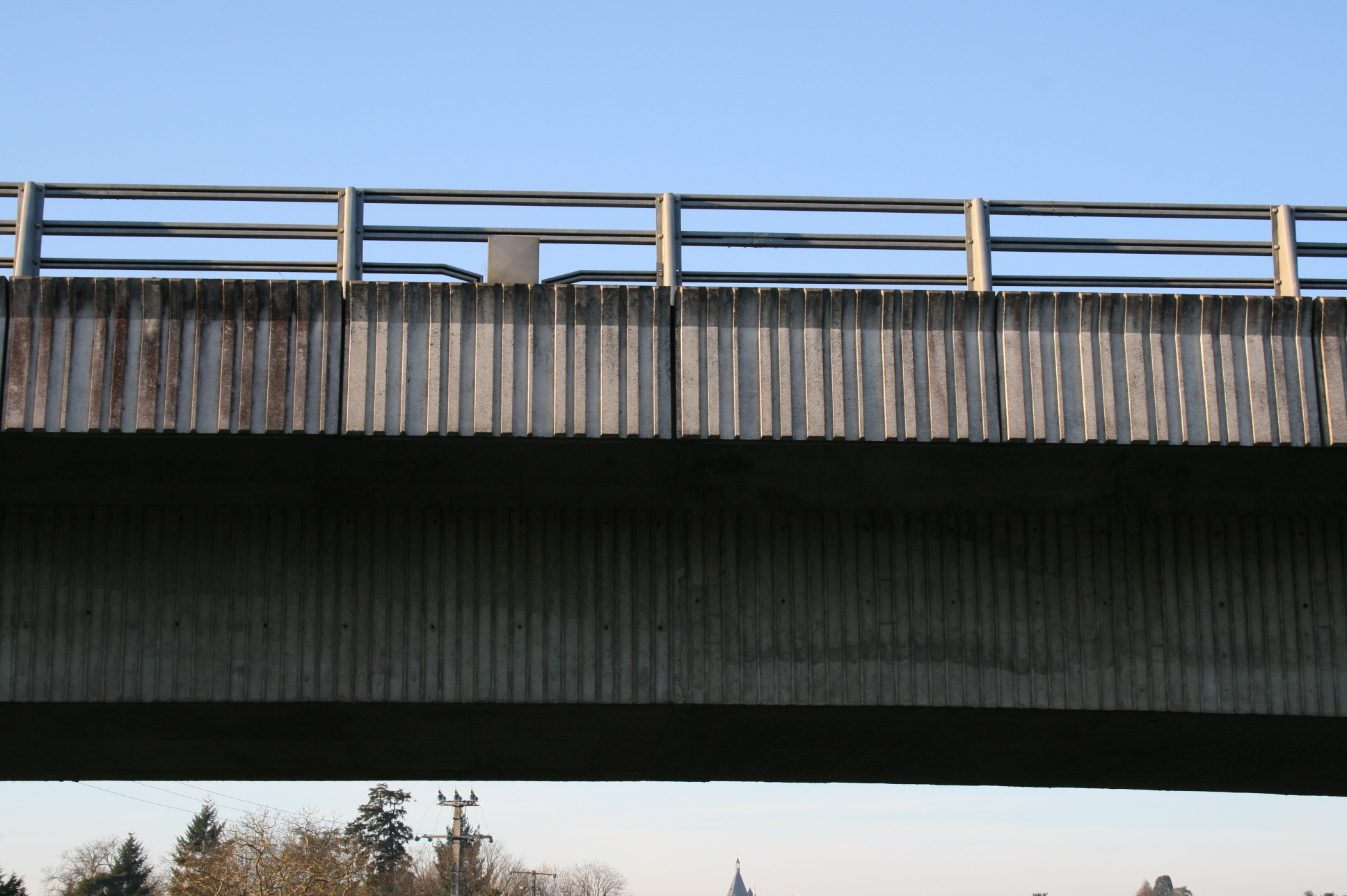 Nouveau pont de Gien (Loiret - France)